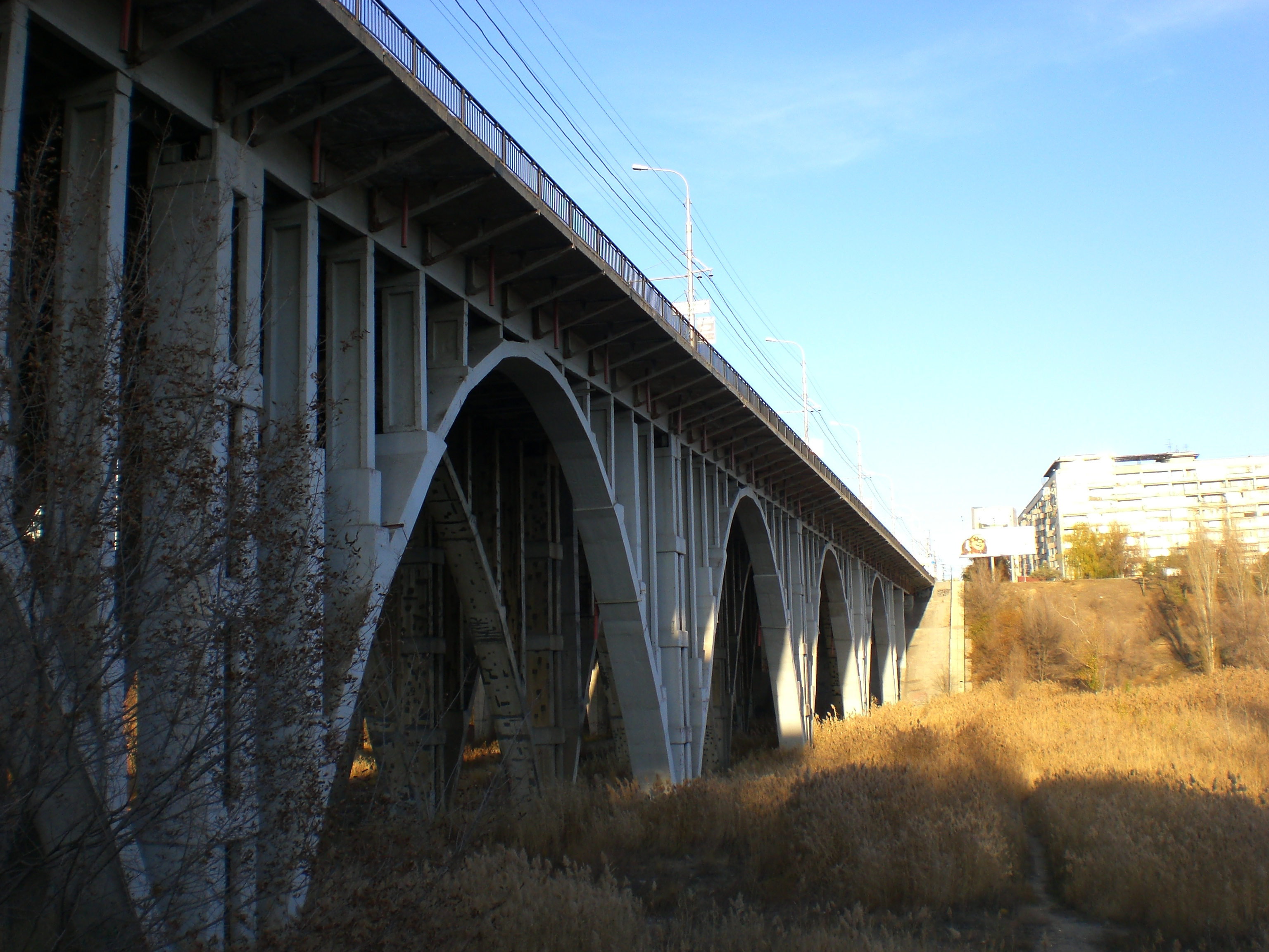 Мост через реку Царица (Волгоград, Россия) Фотография сделанаи из оврага реки Царицы, с полотна детской железной дороги. Впереди Центральный район, за спиной - Ворошиловский, справа - Волга.